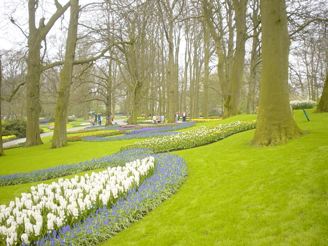 Kuekenhof